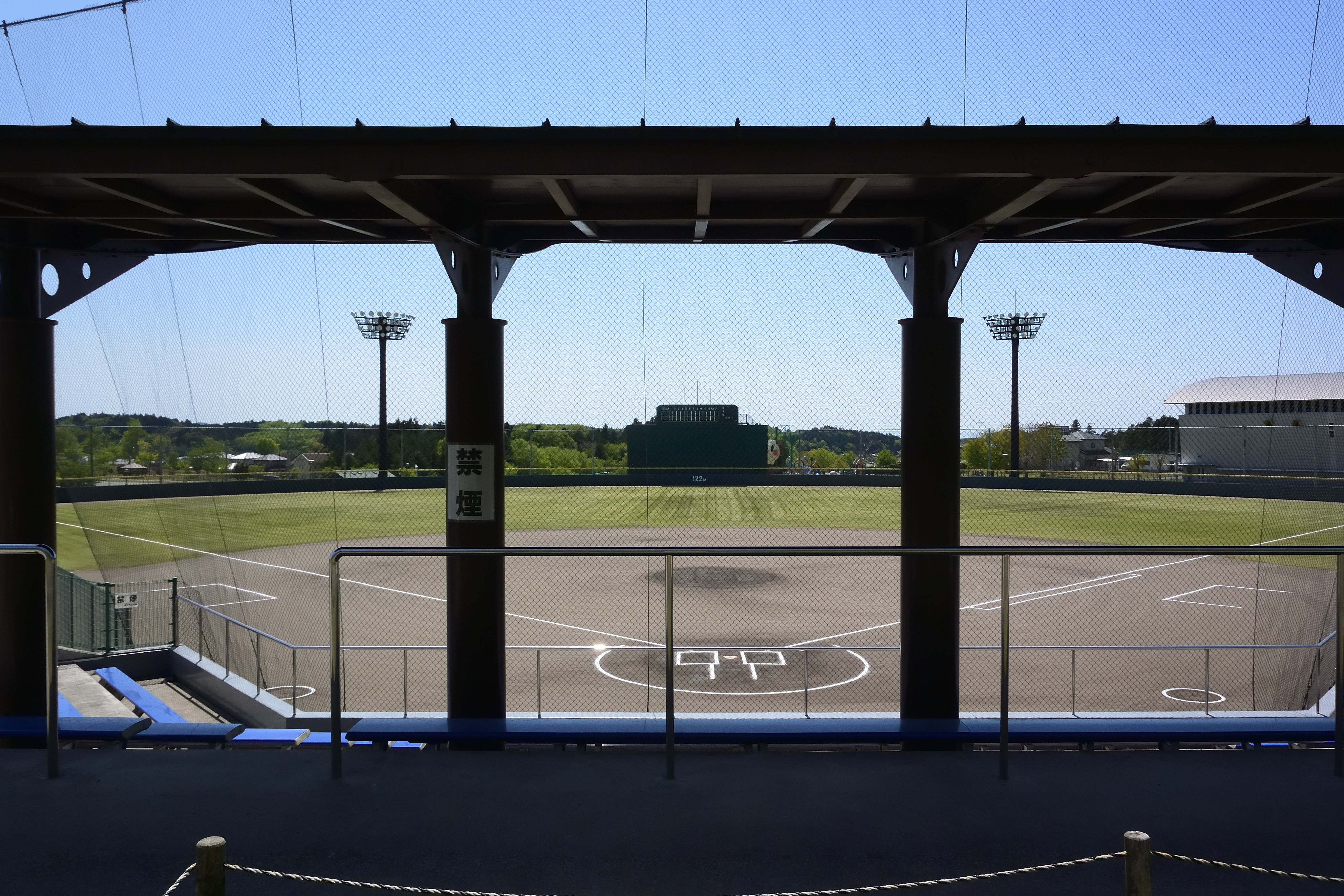 益子町北運動公園野球場